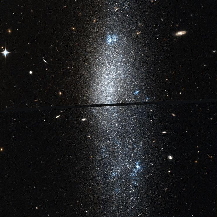 UGC 8837 - Hubble Space Telescope - The Dynamic State of the Dwarf Galaxy Rich Canes Venatici I Region - HST Proposal 10905